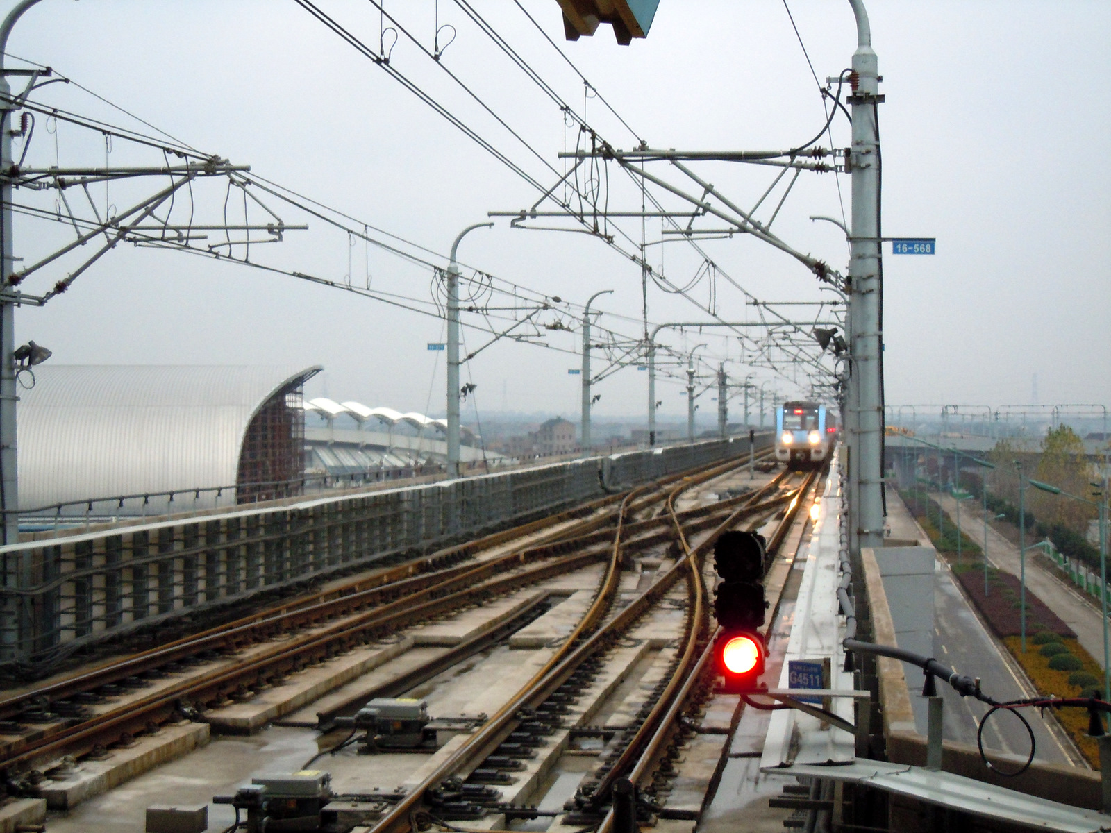 南京地铁1号线南延线南端终点